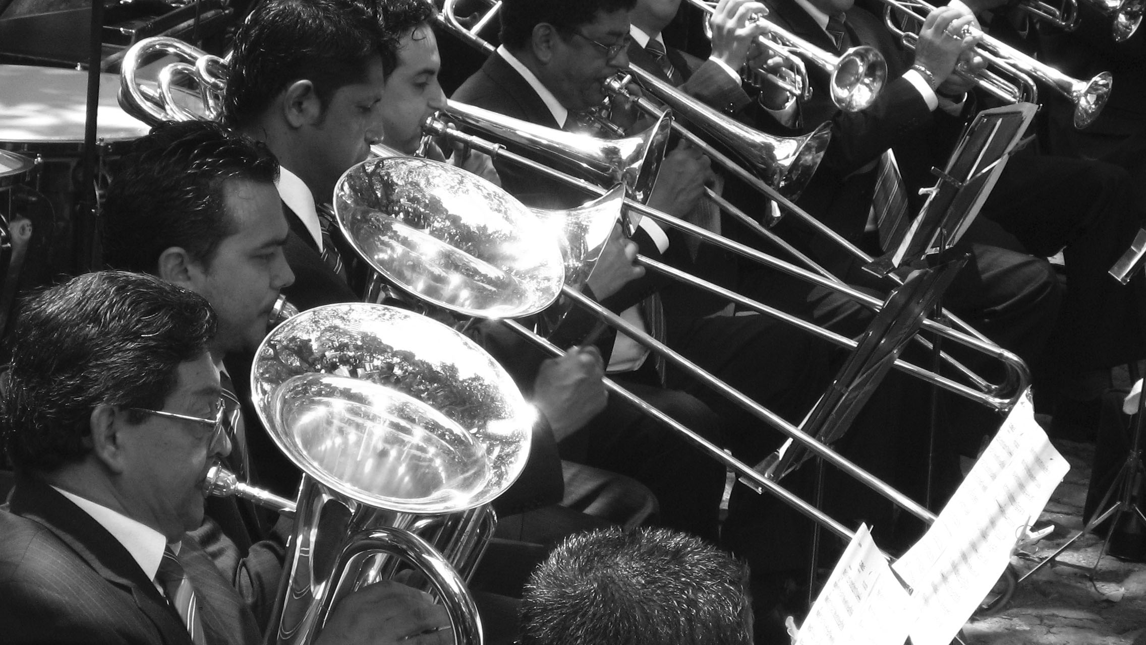 Banda Sinfónica Universidad de Antioquia. Todos los domingos en el Parque Bolívar, uno de los sitios más tradicionales de Medellín, Colombia, la Banda Sinfónica ofrece su tradicional Retreta de Parque.